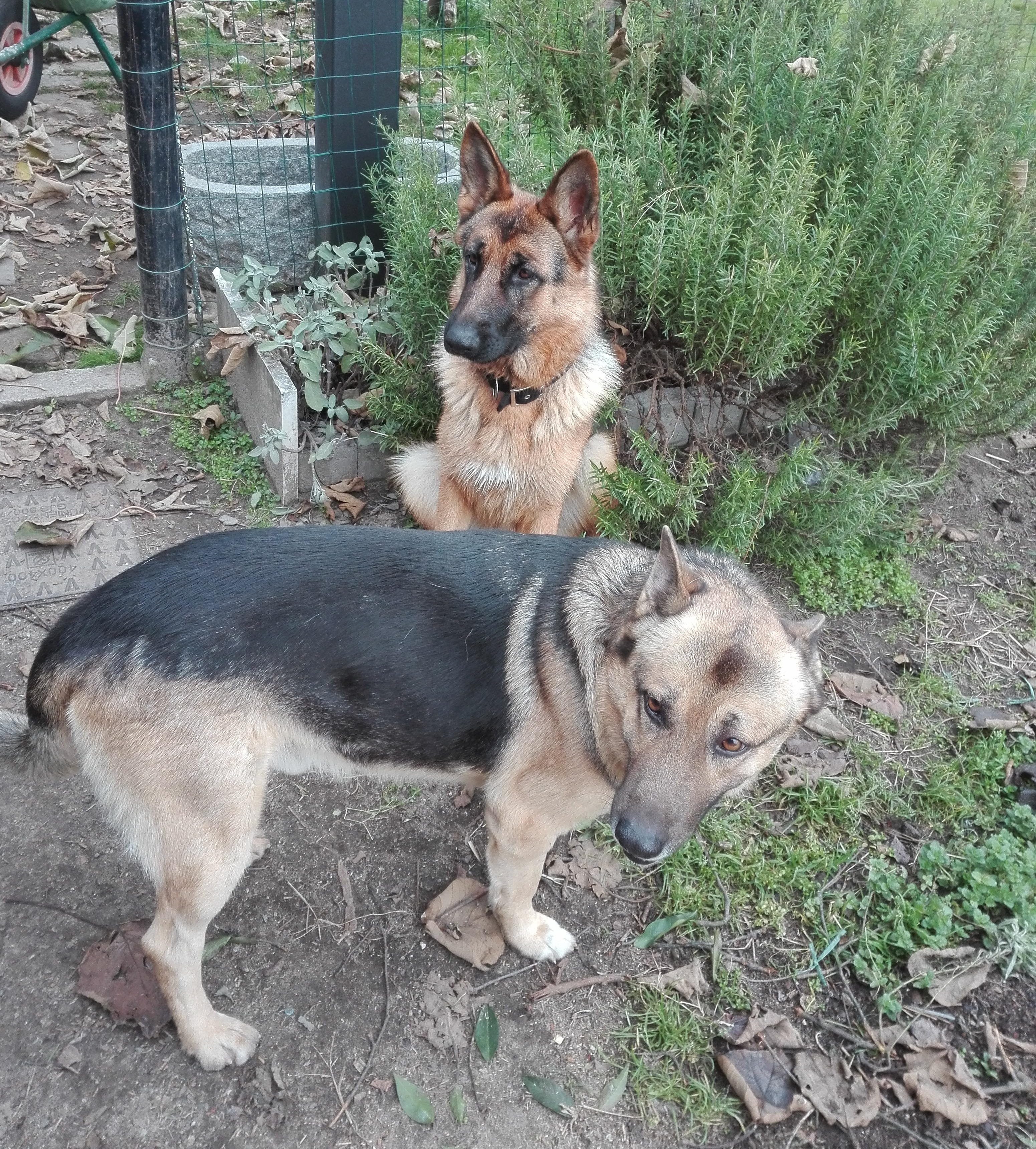 Due esemplari di pastore tedesco di differenti età, 9 anni e 11 mesi